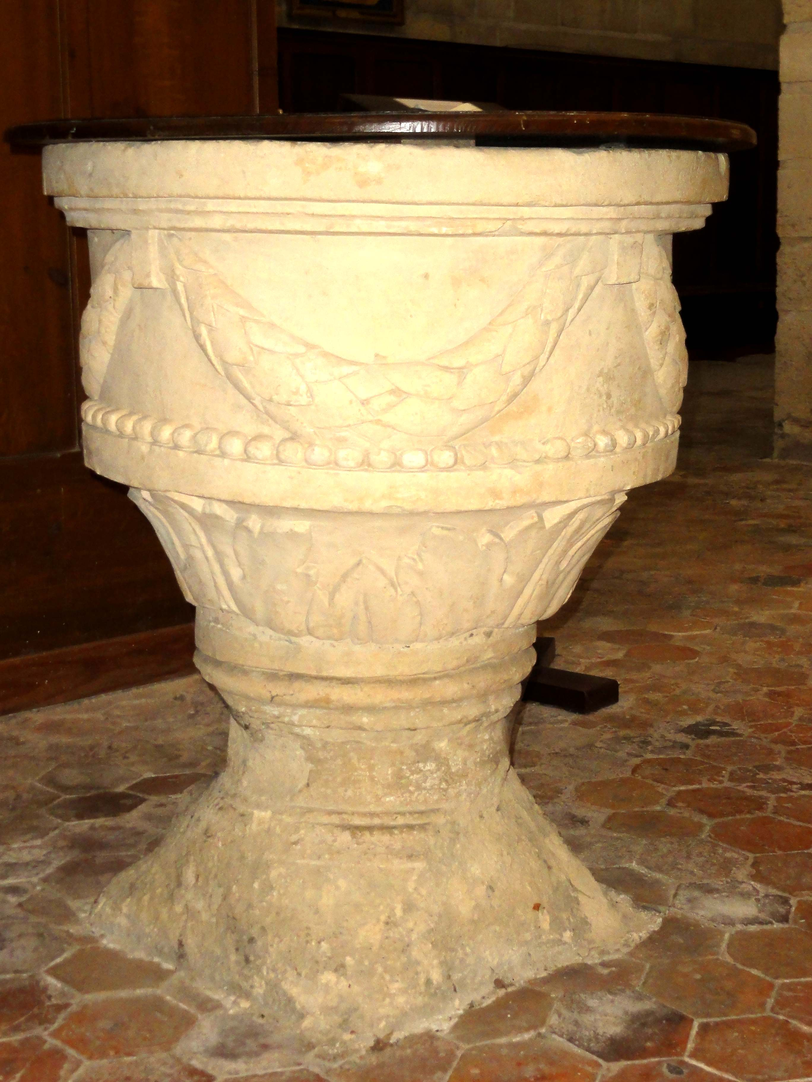 Mobilier de l'église - voir titre.